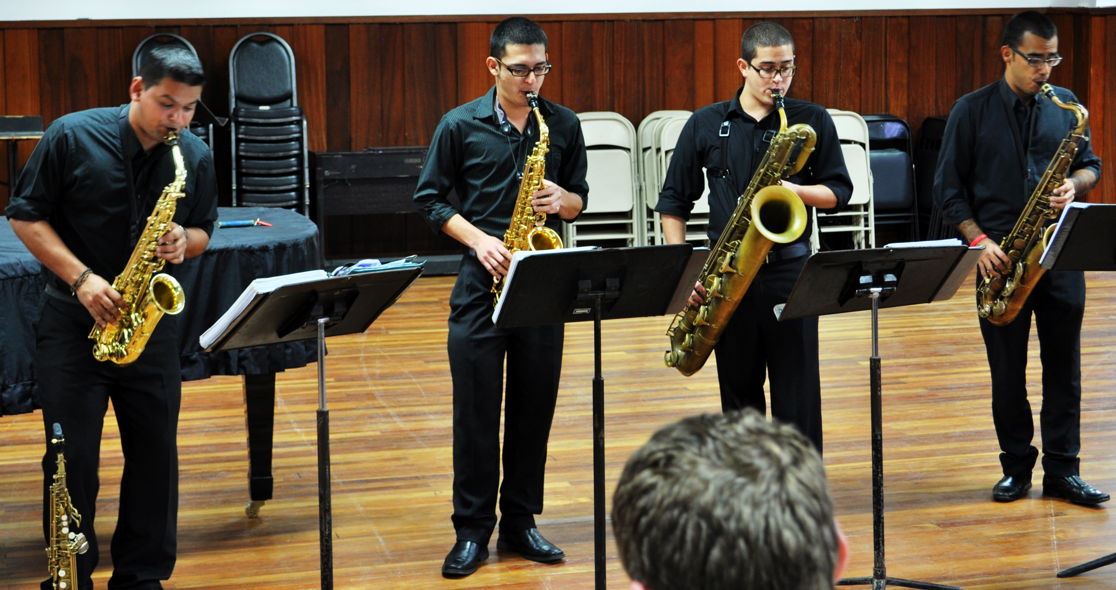 Grupo de saxofonistas en el Centro Nacional de la Música del Ministerio de Cultura y Juventud de Costa Rica.